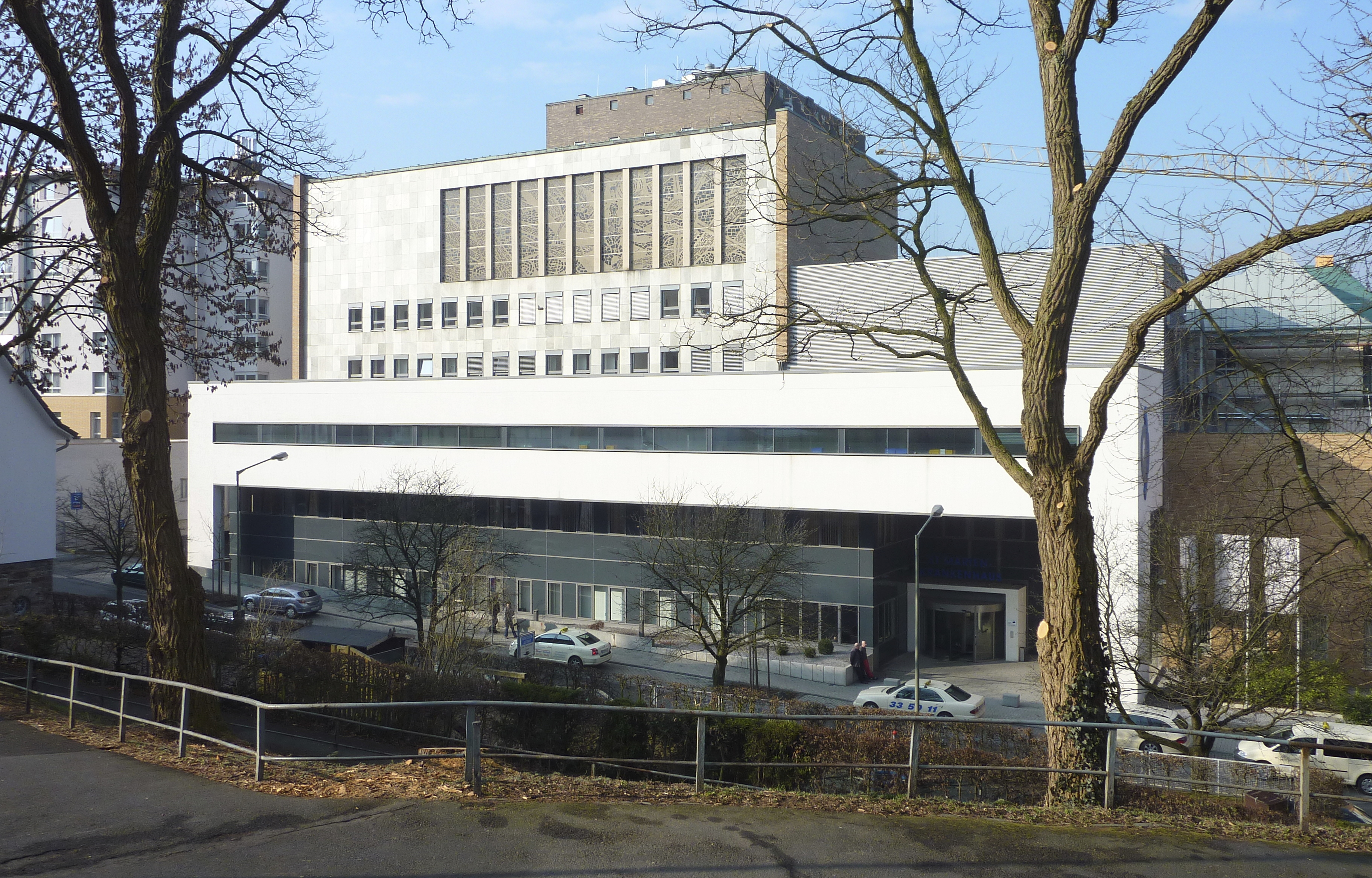 Siegen in Westfalen: Hauptfassade des Marienkrankenhauses am Fuß des Giersbergs